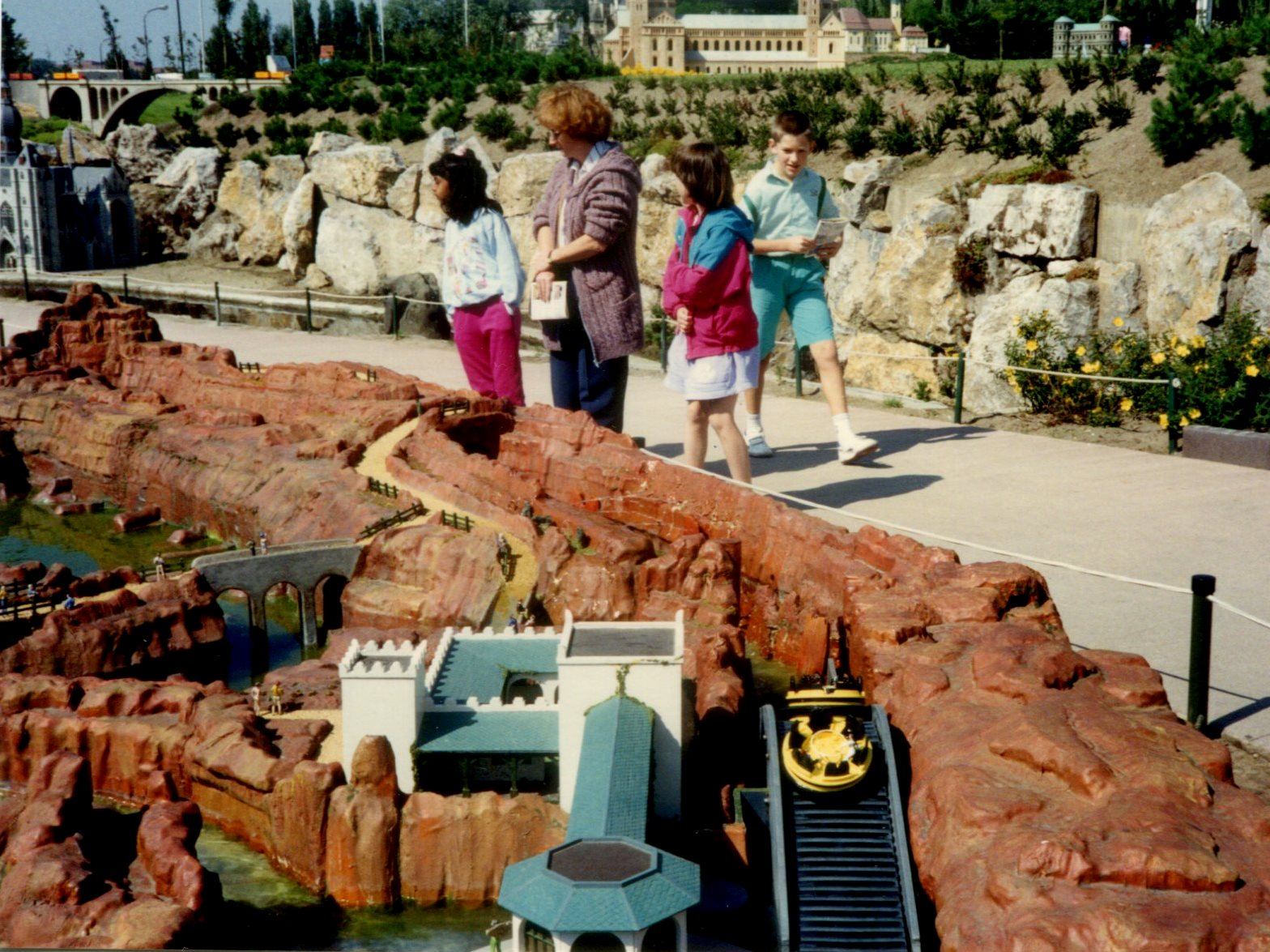 MiniEuropeWalibiRadja